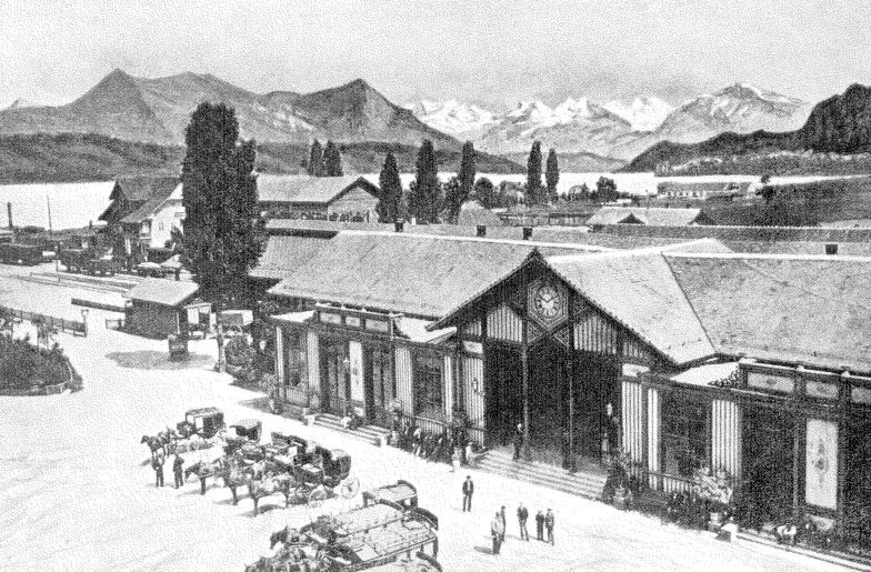 Der erste Bahnhof von Luzern auf der sogenannten Fröschenburg